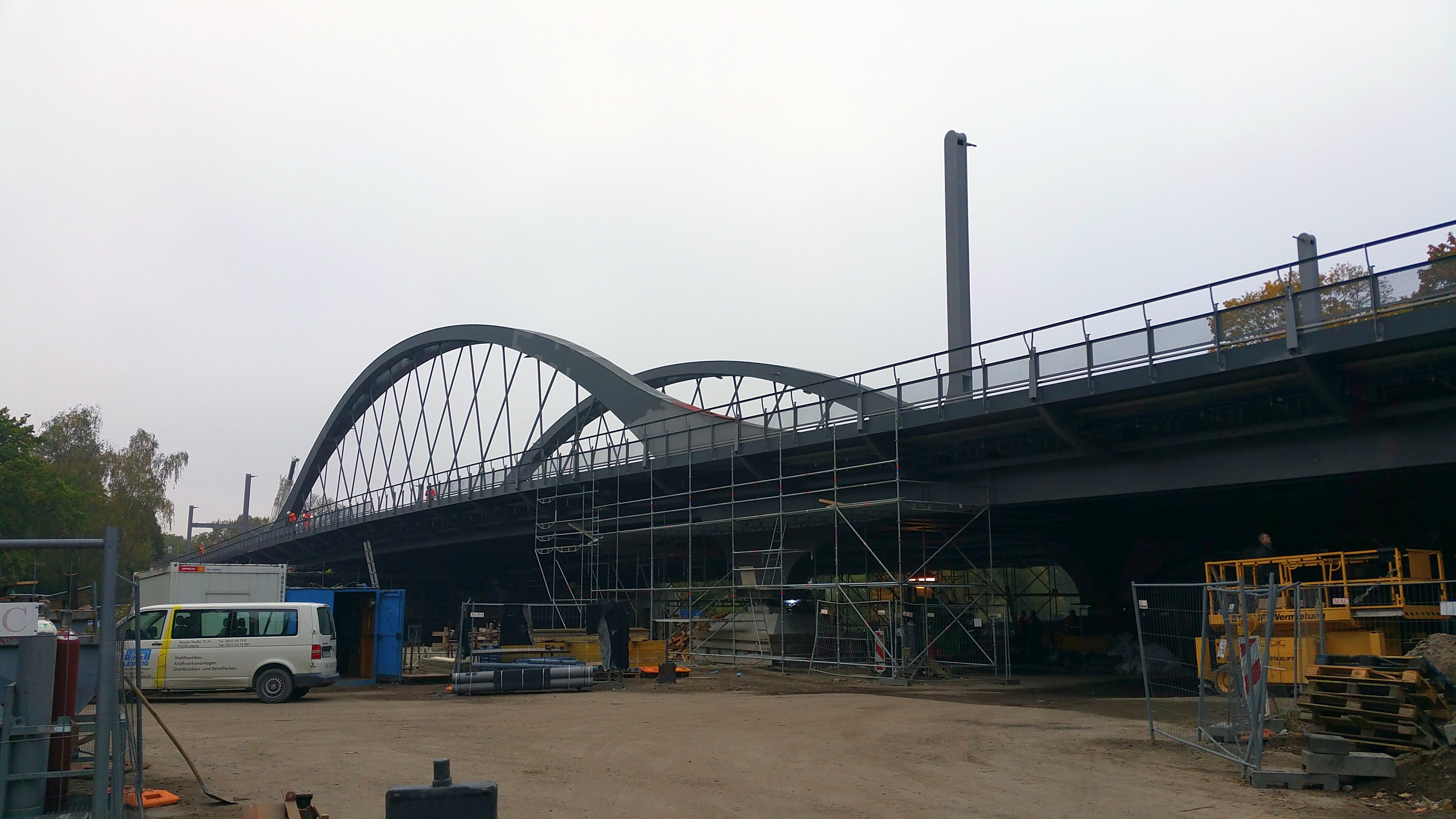 Blick auf Südliche Seite der Freybrücke. Geländerarbeiten.